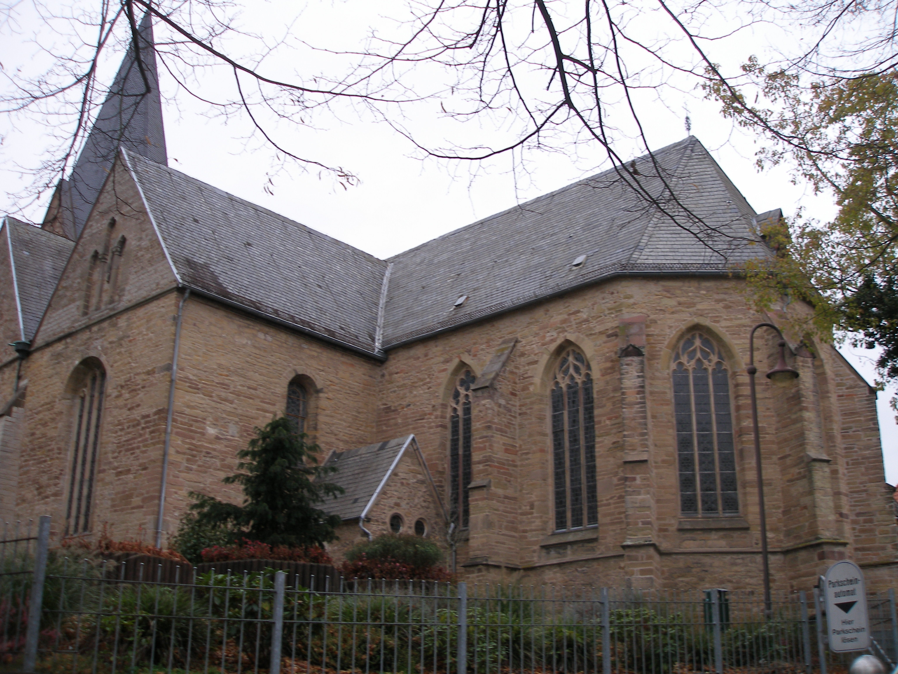 Pfarrkirche